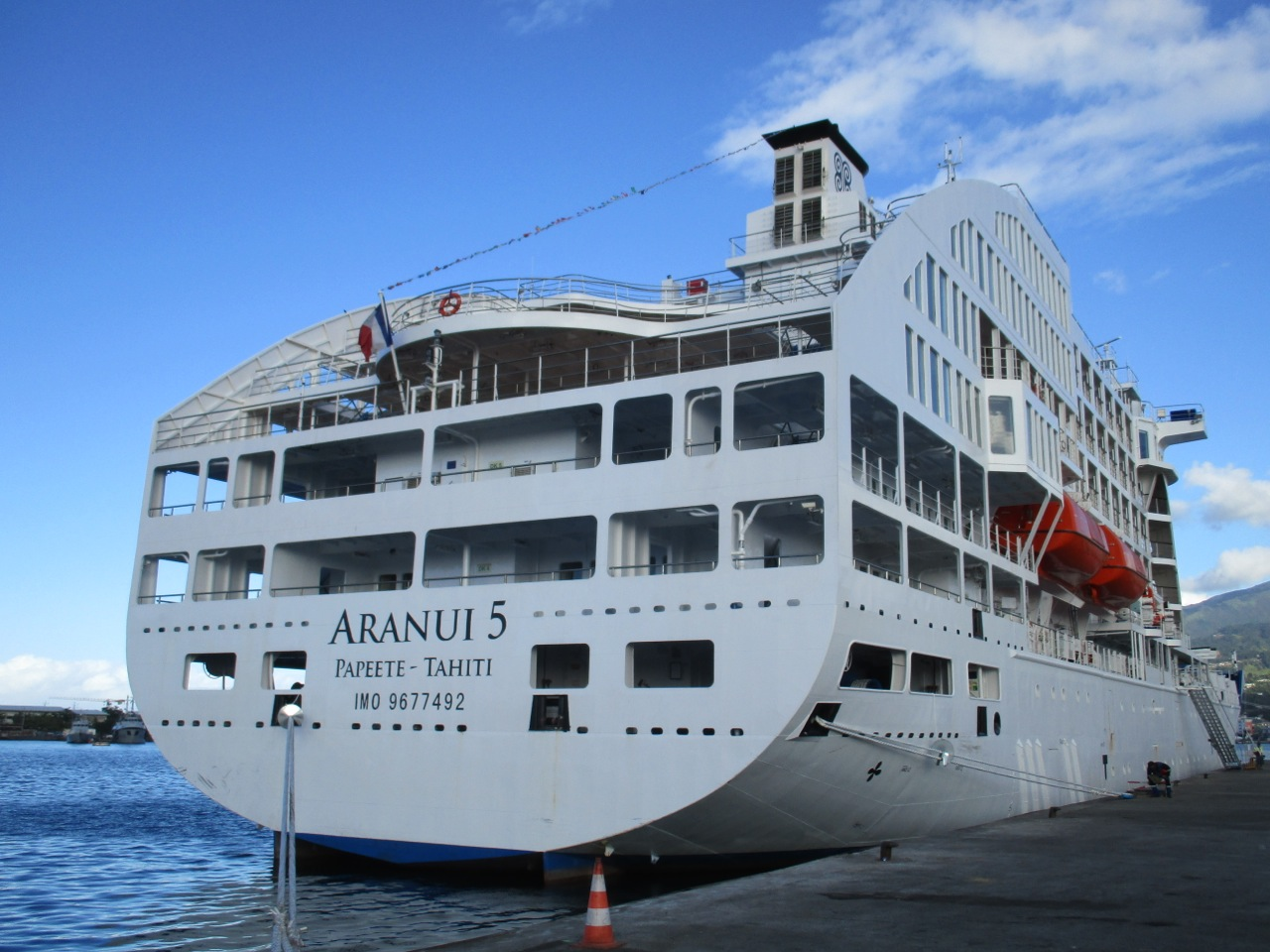 Aranui 5 dans le port de Papeete